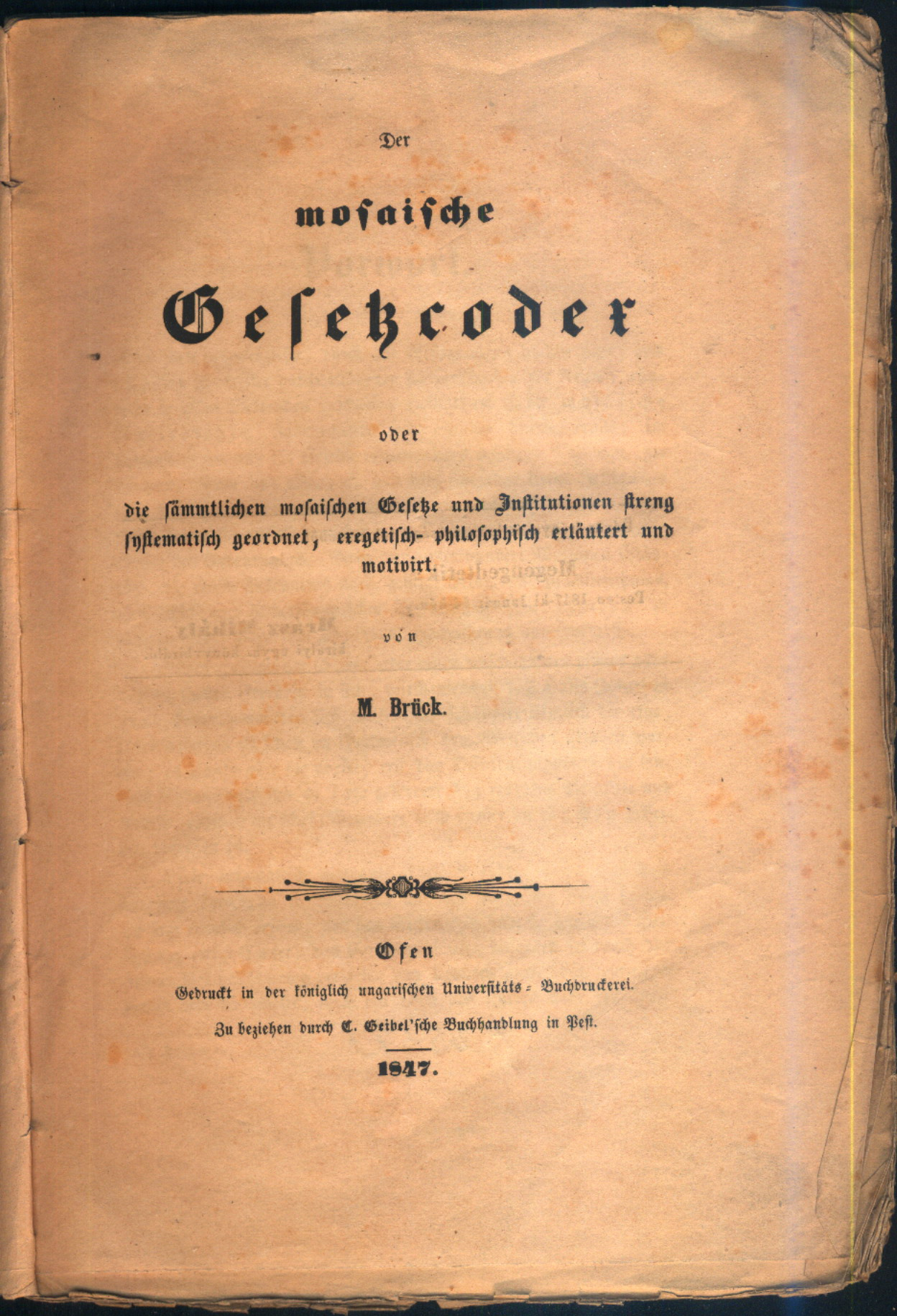 M. Brück Der mosaische Gesezzcodex című munkájának címlapja